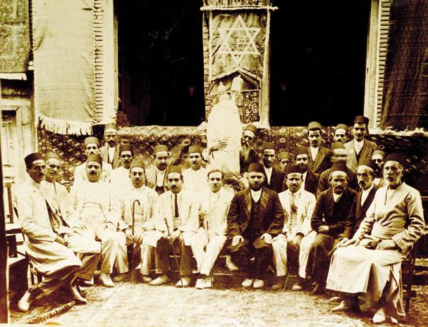 Iranian Jews, Hamedan, 1917.